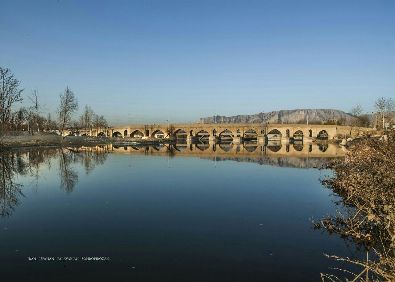 پل بابا محمود سهرفیروزان دوران اولجایتو و دومین پل تاریخی استان اصفهان ثبت ملی شده در 25 اسفند 1345 با شماره 634